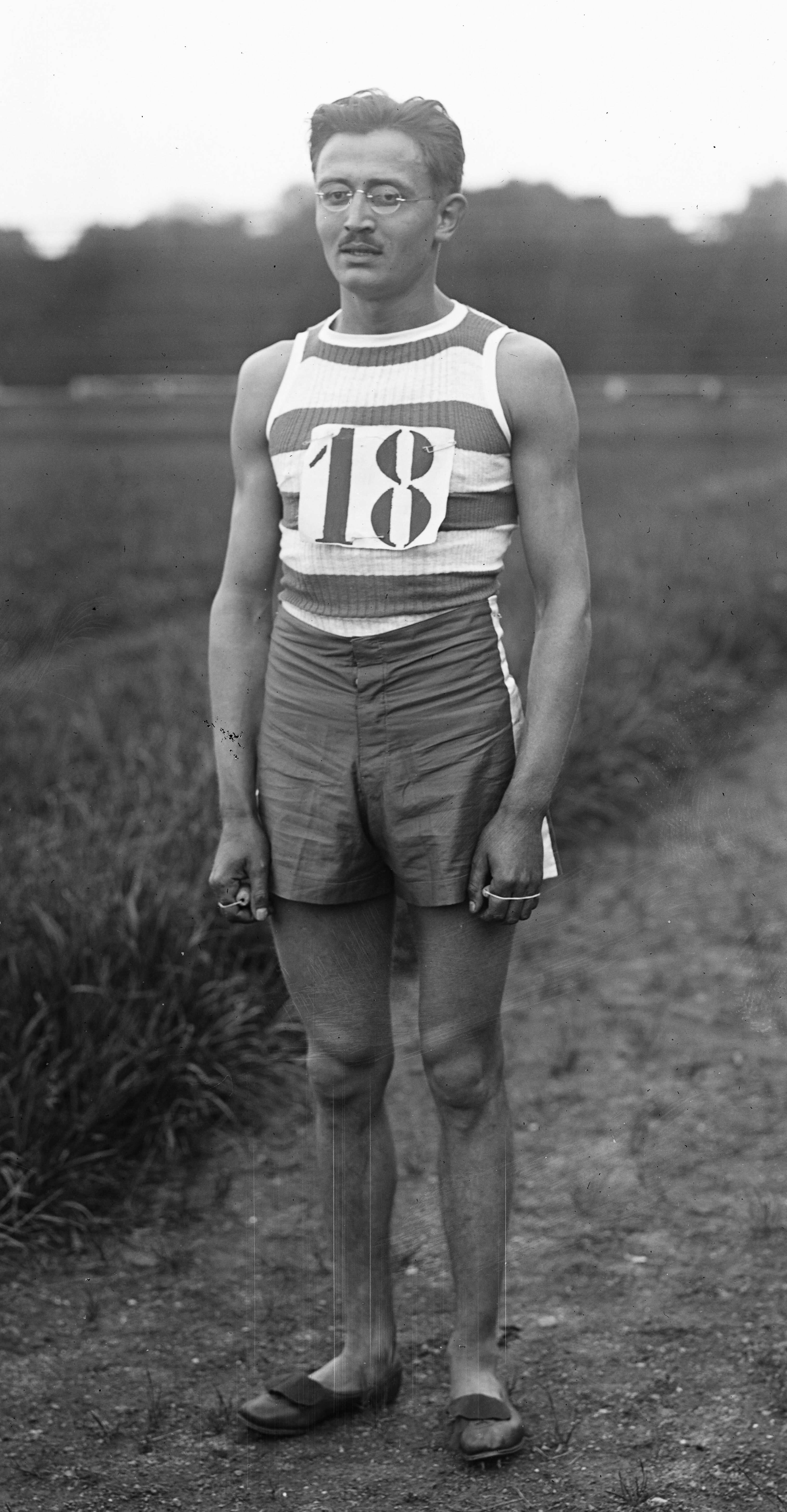 13/5/20, Colombes, Burtin, vainqueur [du challenge] du Mille : [photographie de presse] / [Agence Rol]